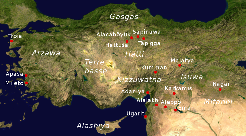 Anatolia durante l'epoca dell'Impero ittila: principali città e regni confinanti.